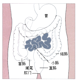 小肠（由英文维基图片中文化: File:Stomach colon rectum diagram.svg）